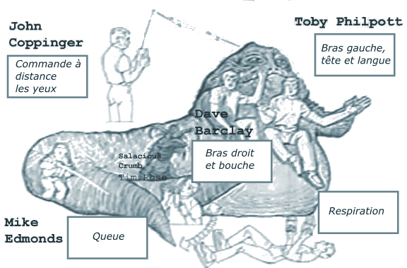 Version française de InsideJabba-full.jpeg